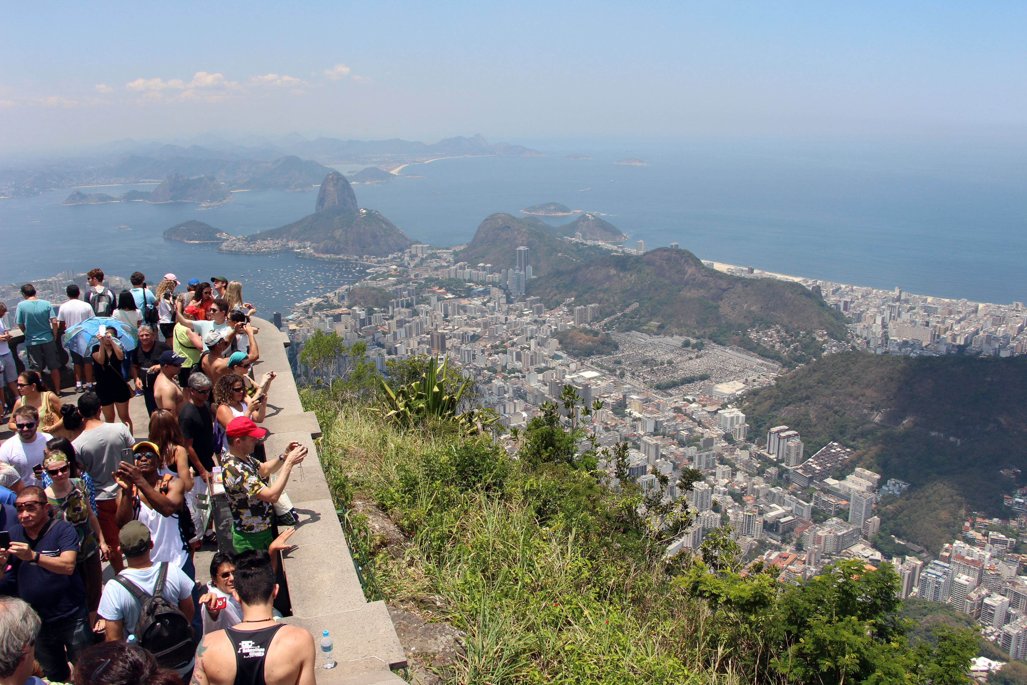 Rio de Janeiro